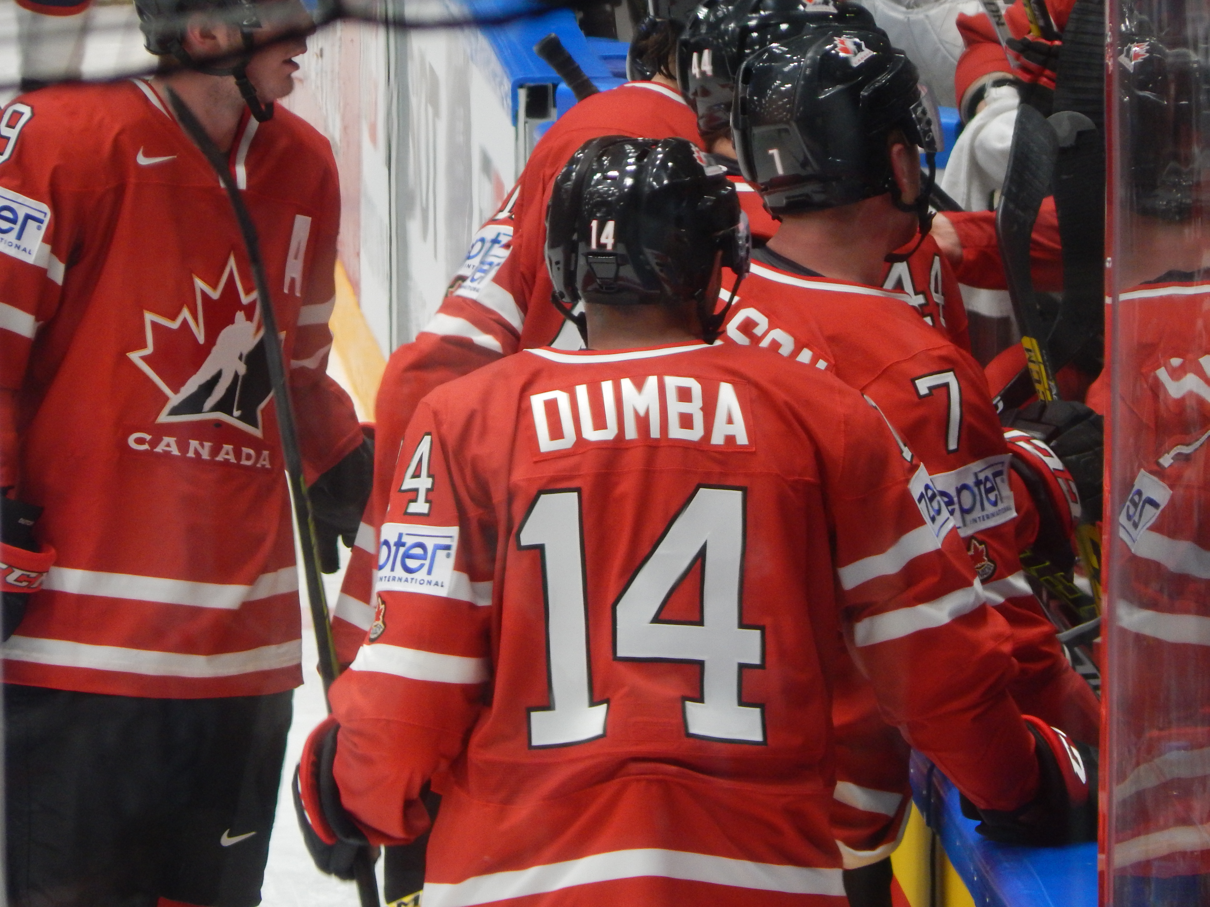 Игроки сборной Канады рядом со своей скамейкой